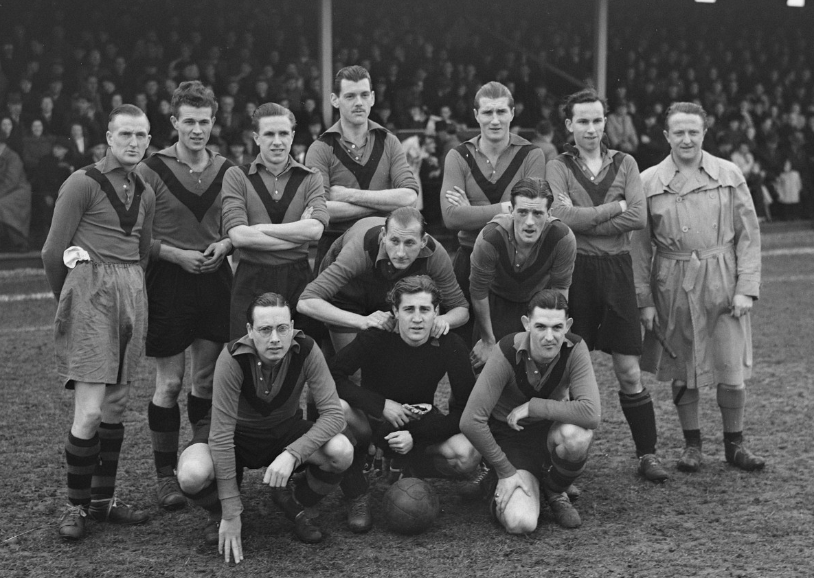 AFC tegen HOC. AFC elftal.Staand vlnr: Chris Geluk, Henk Sonnevelt, Paul Meyer, Wally van Weelde, Dick Disselkoen, Aad Veltema en Theo van Nigtevegt;midden vlnr: Gerrie Stallman en Coen Colijn;zittend vlnr: Gerry ter Horst, Joop Zimmermann en Johnny Claus.